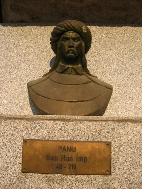 Panu (Tanhu)